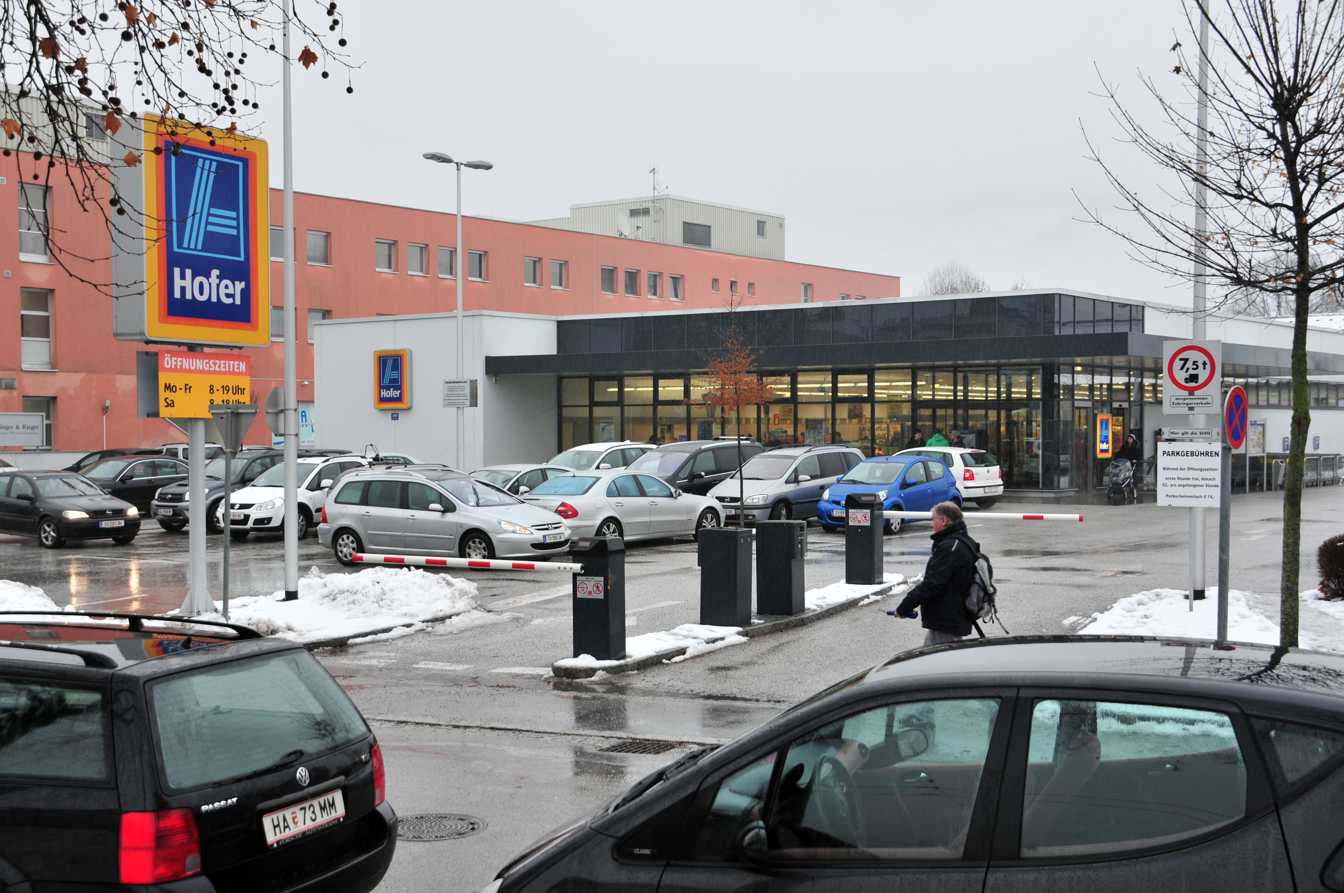 Hofer-Markt in Salzburg